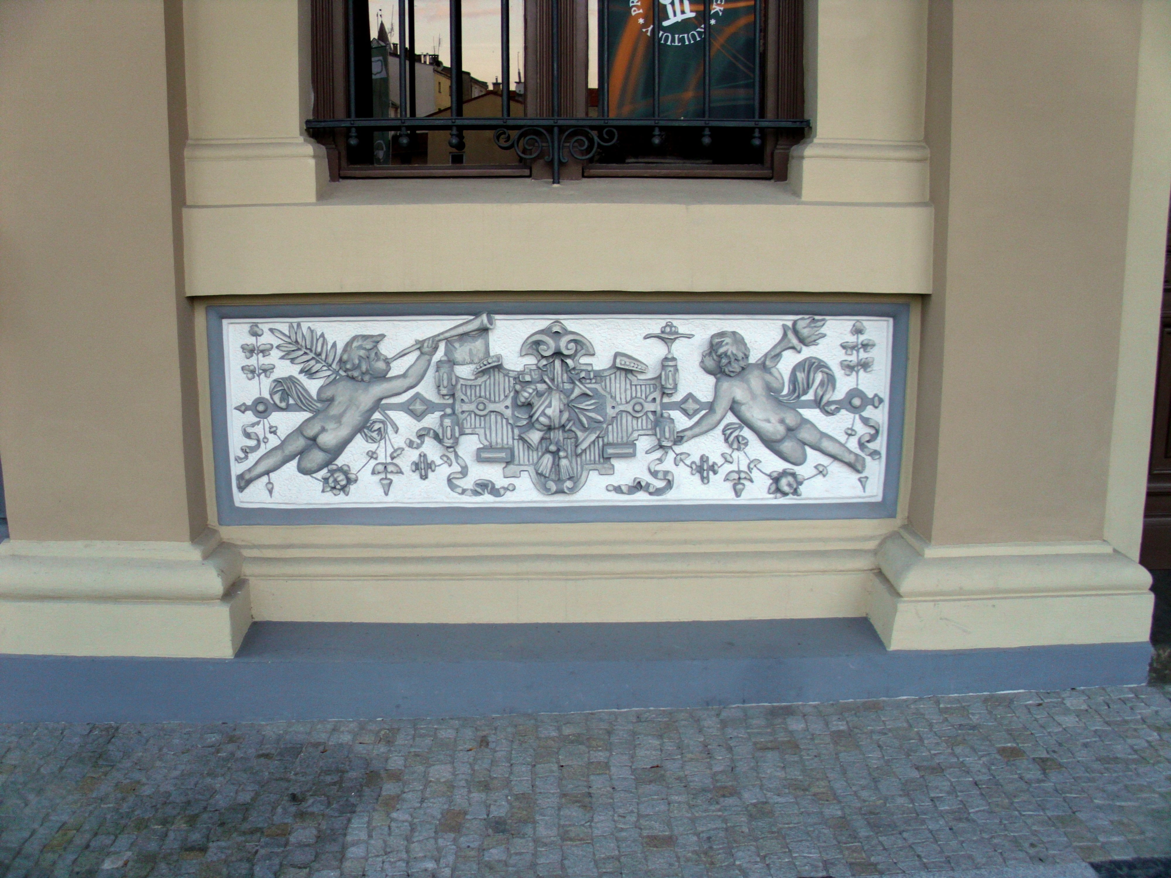 Prudnik, ul. Kościuszki, willa, ob. dom kultury, k. XIX